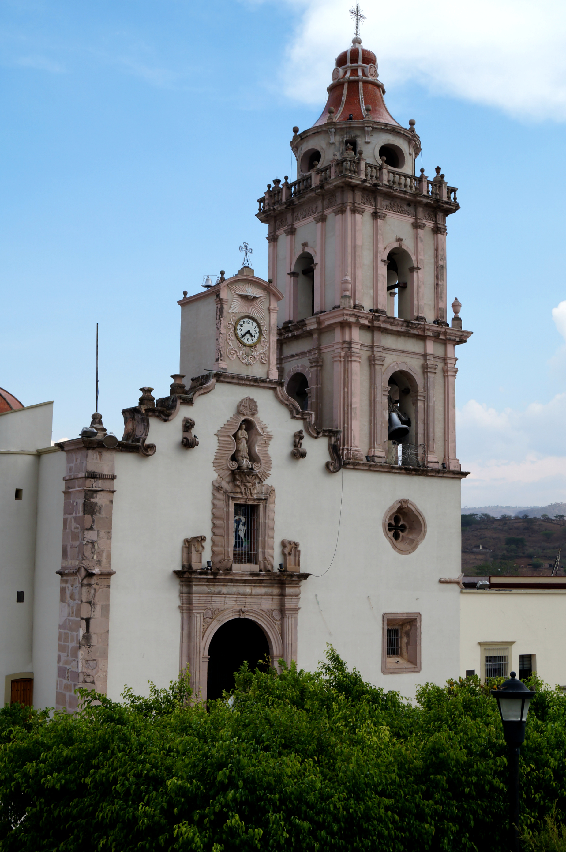 Parroquia de Santo Santiago Apostol, data del siglo XVIII, la edificación cuenta con un estilo de arquitectura barroco